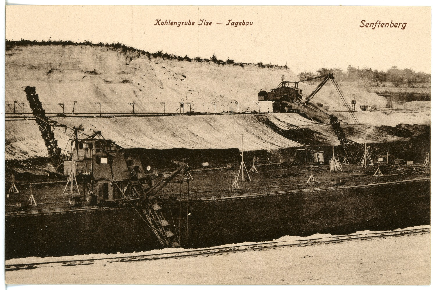 Senftenberg; Kohlengrube Ilse - Tagebau This postcard is from publisher Brück & Sohn in Meißen ( postcard has a unique number 20830 and is available in a higher resolution at the publisher. This images was uploaded in a cooperation project between Wikipedians and the publisher.